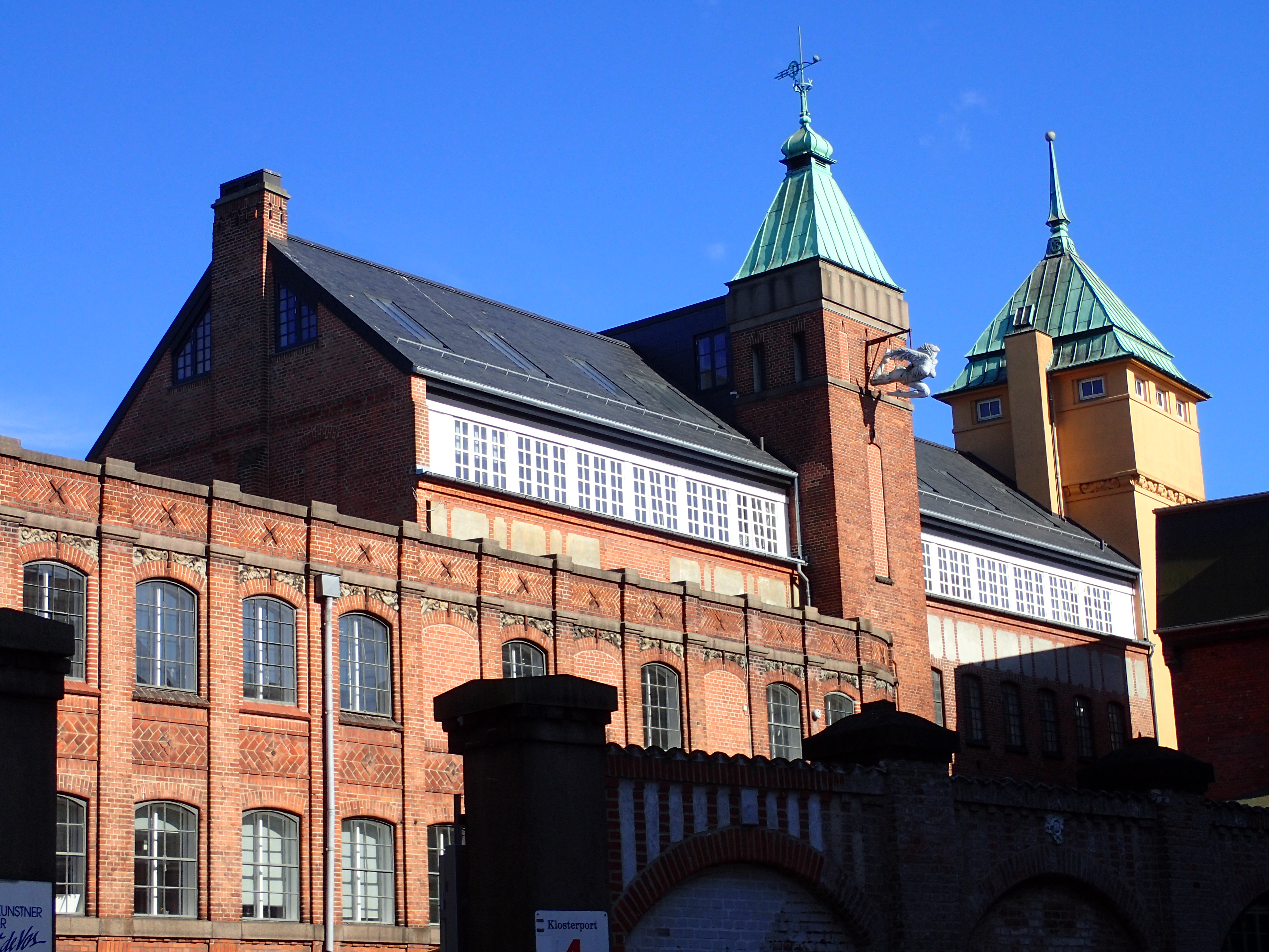 Chokoladefabrikken Elvirasminde